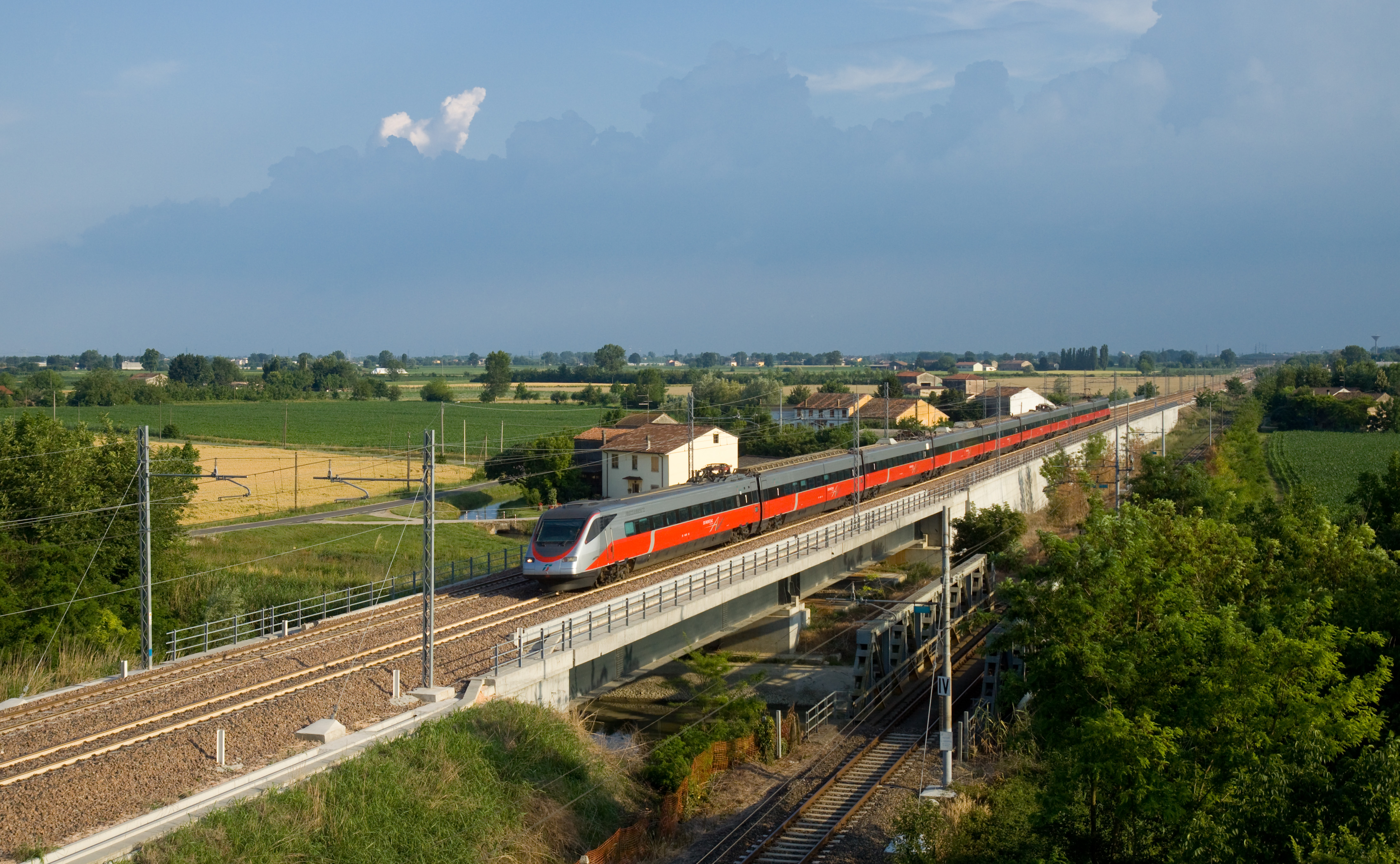 Elettrotreno ETR 485 di Trenitalia in corsa sulla linea Verona-Bologna, presso Revere.